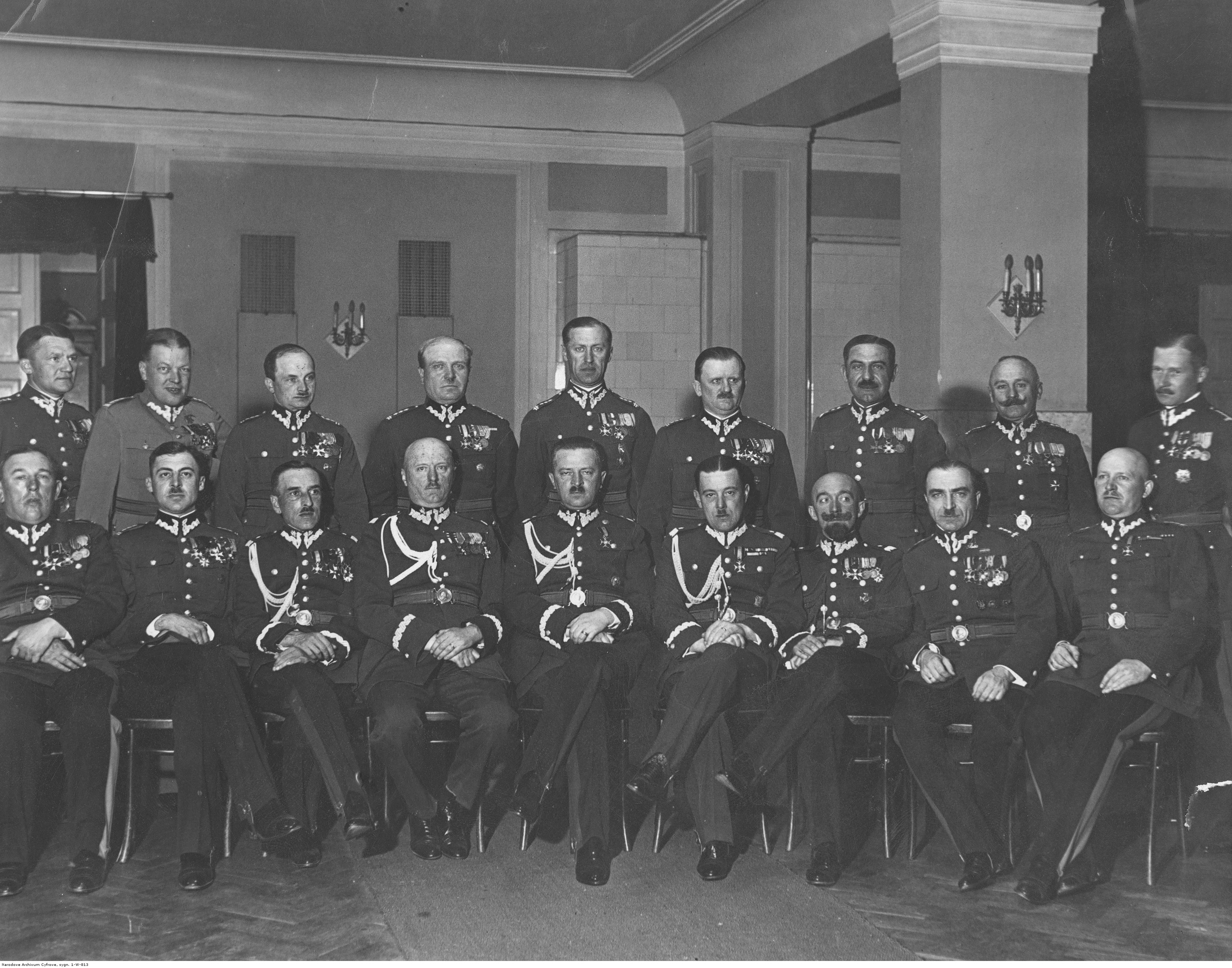 Centrum Wyższych Studiów Wojskowych w Warszawie - uczestnicy V kursu; czerwiec 1931. Siedzą od prawej: płk Stanisław Kozicki, płk Wilhelm Orlik-Ruckemann, gen. Tadeusz Malinowski, gen. Czesław Młot-Fijałkowski, gen. Janusz Głuchowski, gen. Jerzy Wołkowicki, gen. Stanisław Skwarczyński, płk Kazimierz Schally, płk Bernard Mond. Stoją: płk Stefan Dembiński (1. z prawej), płk Leopold Cehak (2. z prawej), płk Jan Maciej Bold (4. z prawej), płk Wincenty Jasiewicz (5. z prawej), płk Kazimierz Sawa-Sawicki (3. z lewej), Stefan Hanka-Kulesza (1. z lewej), płk Janusz de Beaurain (2. z lewej), płk Roman Bolesław Ciborowski, płk Eugeniusz Gałuszczyński. Koncern Ilustrowany Kurier Codzienny - Archiwum Ilustracji. Sygnatura: 1-W-813